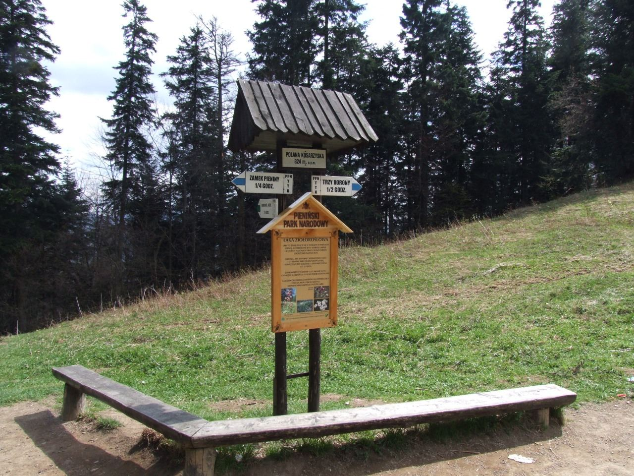 Polana Kosarzyska